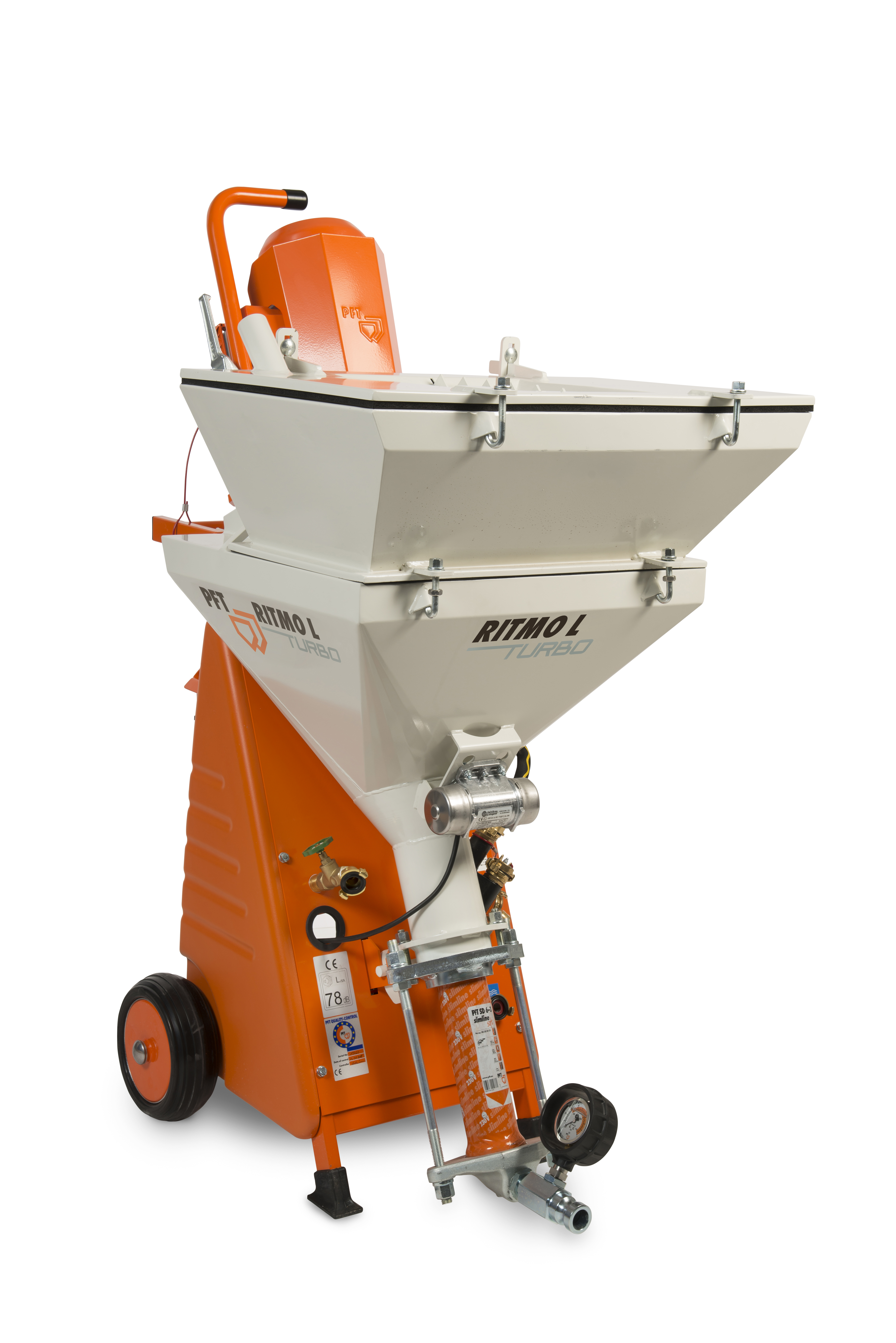 De machine mengt en pompt de mortel en de stucadoor spuit de mortel via een slang aan de wand of plafond.